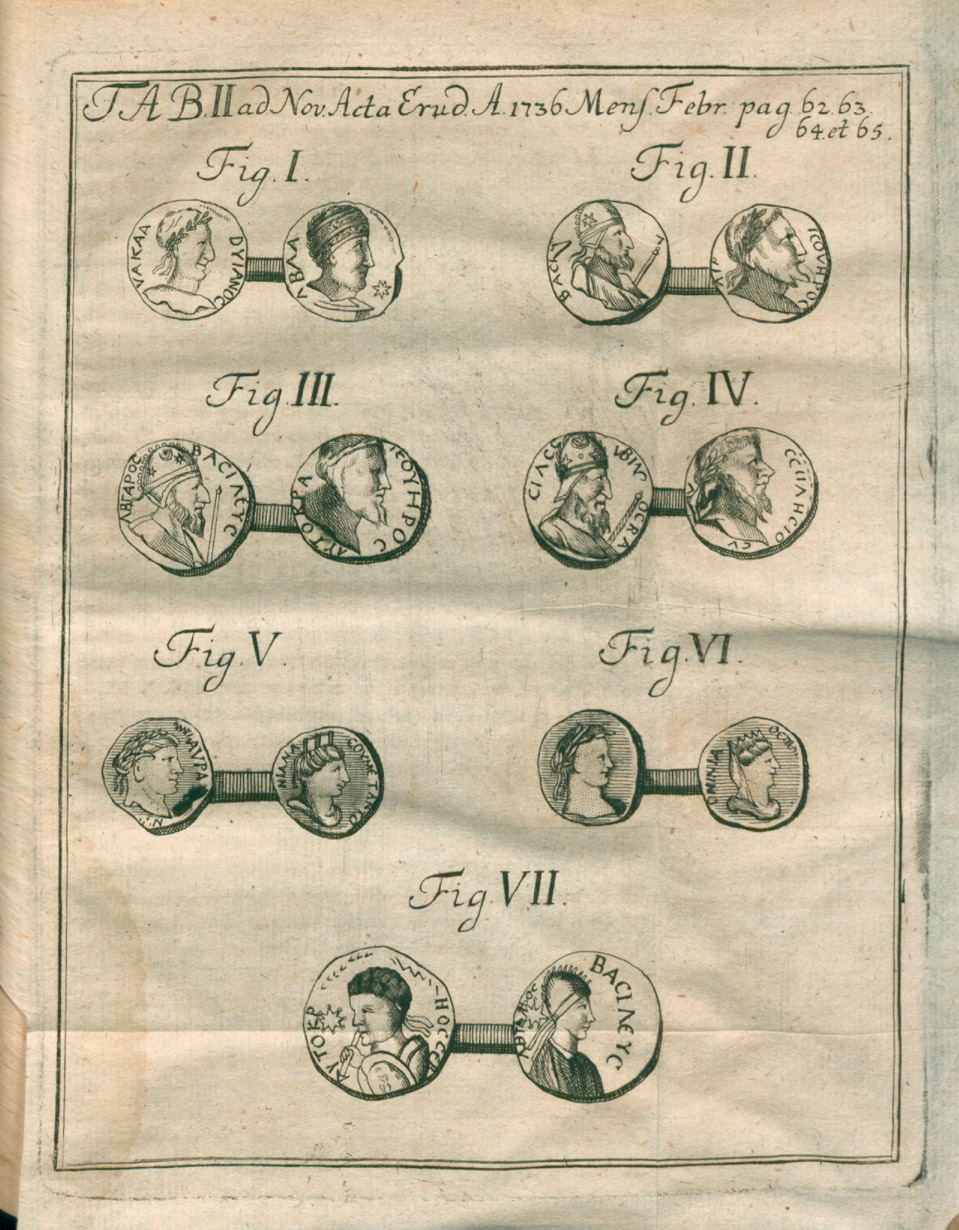 Illustration